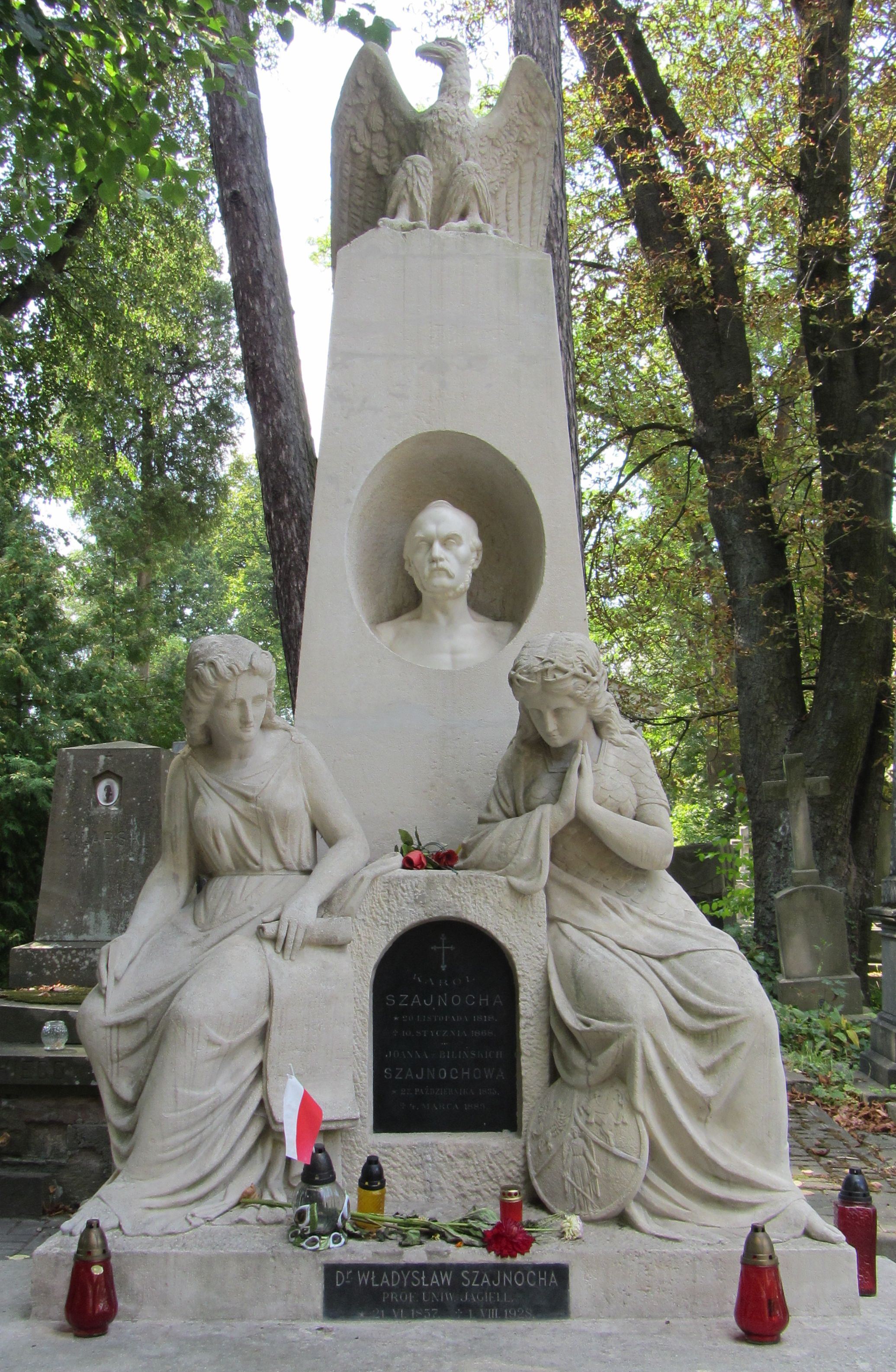 Cmentarz Łyczakowski we Lwowie